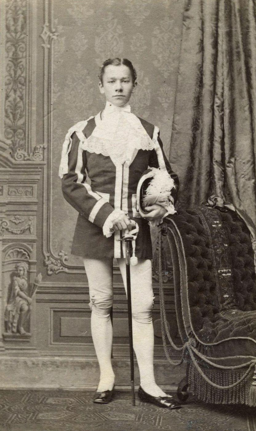 Reinhard Karl Wilhelm Dietrich von Gemmingen (* 27. Dezember 1859 auf Stettenfels; † 4. November 1909 in Illenau) Bildquelle: Hauptstaatsarchiv Stuttgart M 707 Nr. 448 Bildnissammlung I / 1870-1921